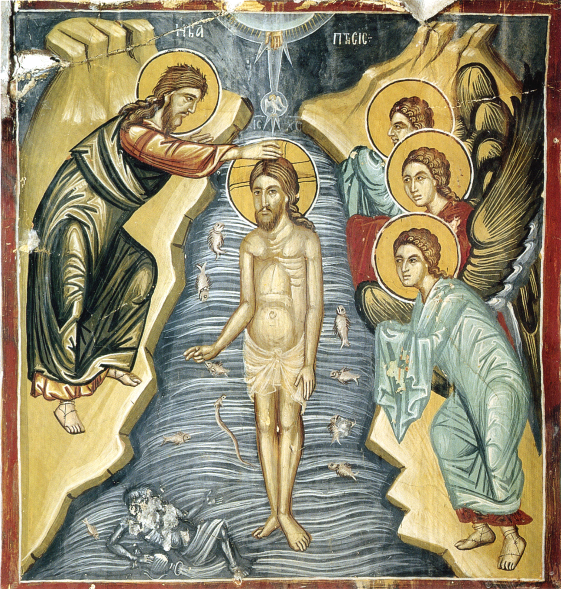 Fresko einer Taufe Jesu im Jordan in der Erzengel- oder Theotokos-Kirche in Galata, Zypern